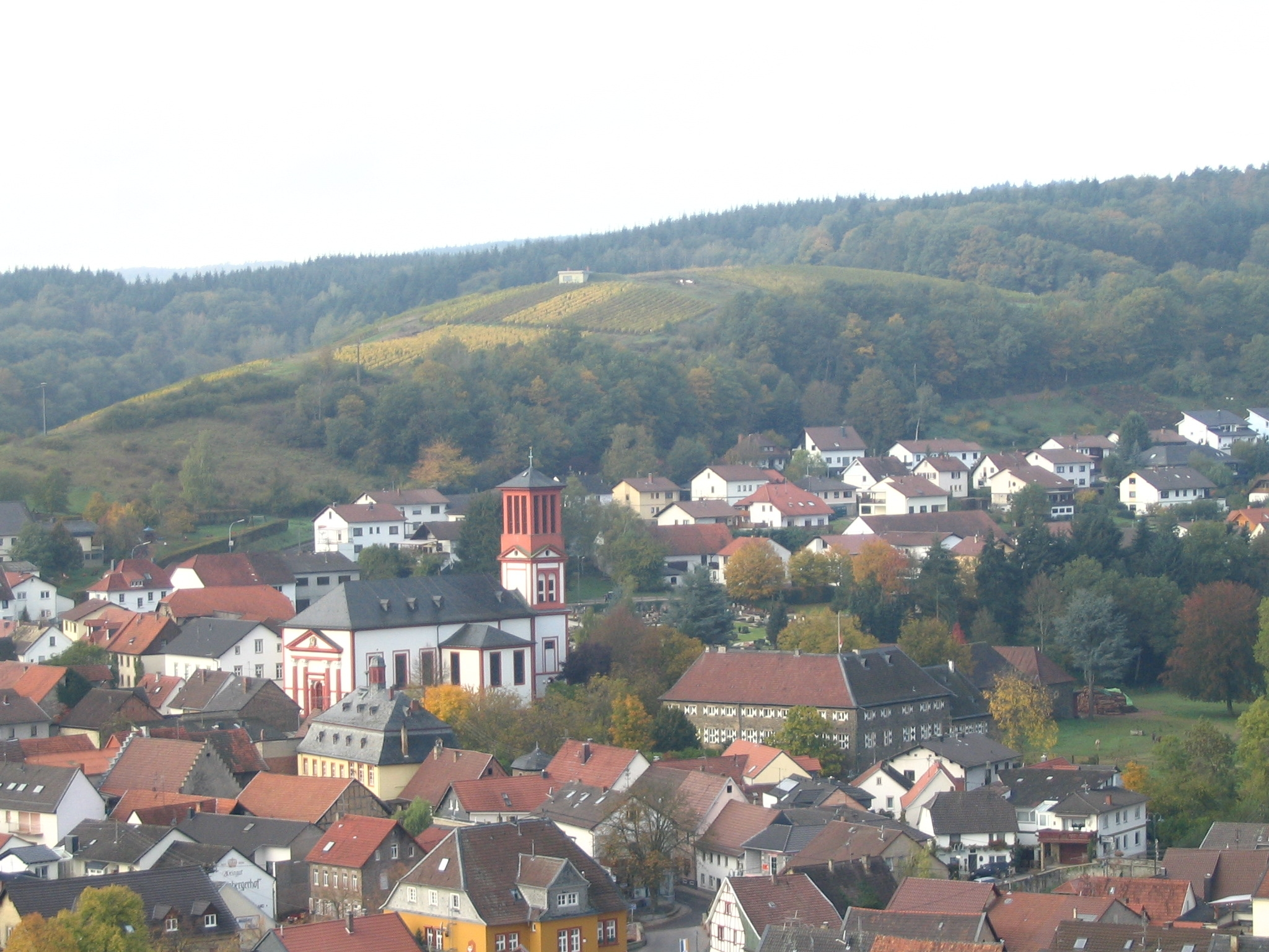 Wallhausen Dorfmitte